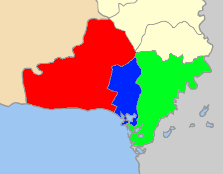 Χάρτης των ενοτήτων (και πρώην δήμων) από τις οποίες αποτελείται ο Δήμος Αλεξανδρούπολης. Αλεξανδρούπολης Τραϊανούπολης Φερών